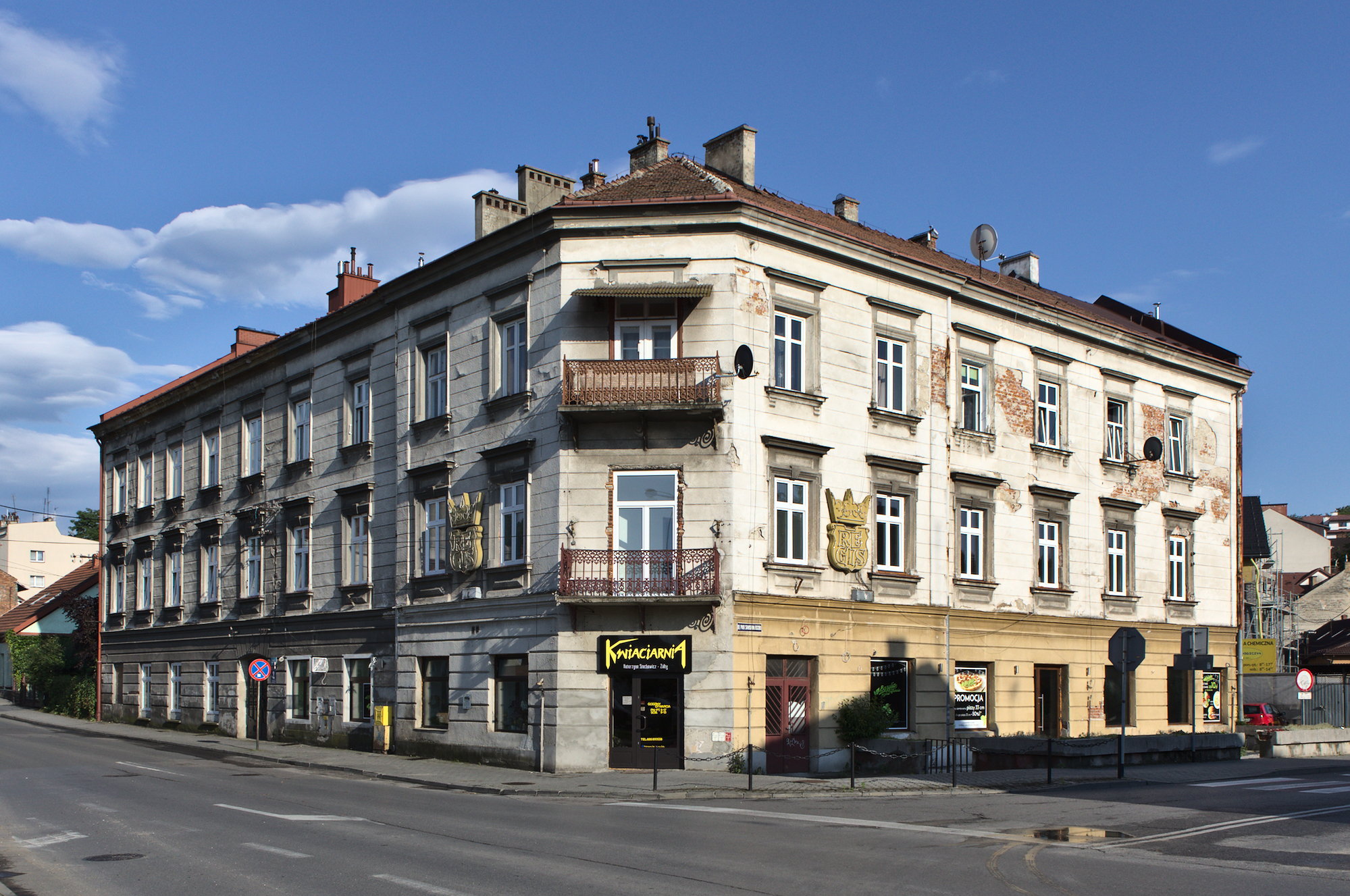 Dawna synagoga w Bochni przy ulicy Floris.